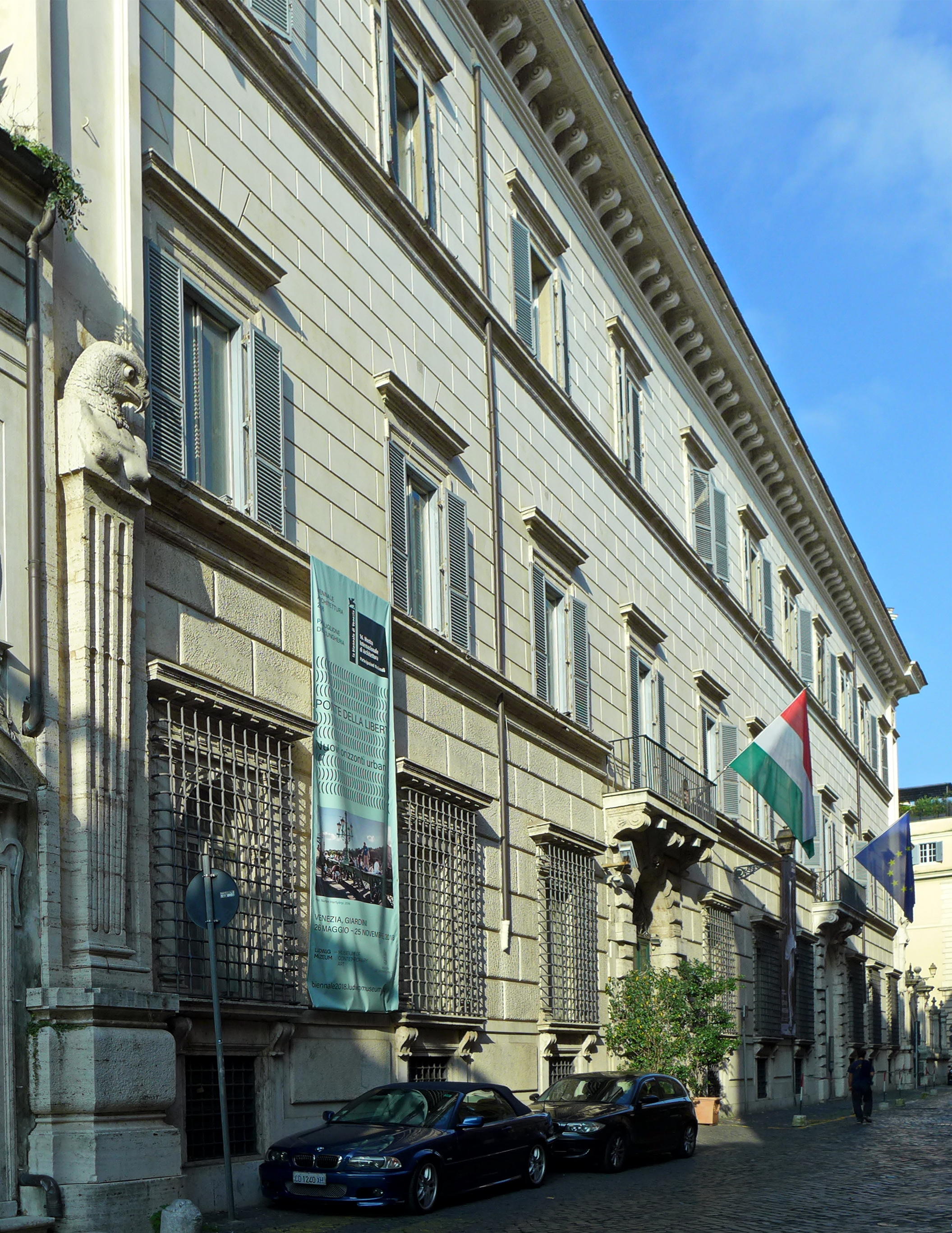 Roma, via Giulia: palazzo Falconieri